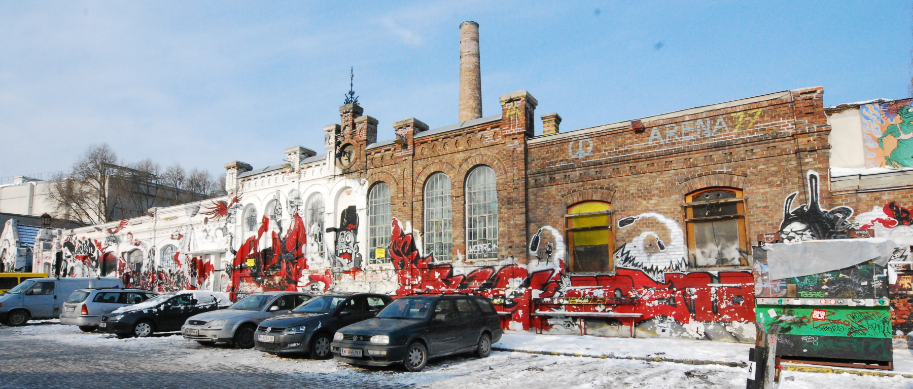 ehemaliger Schweineschlachthof in Sankt Marx (Wien)